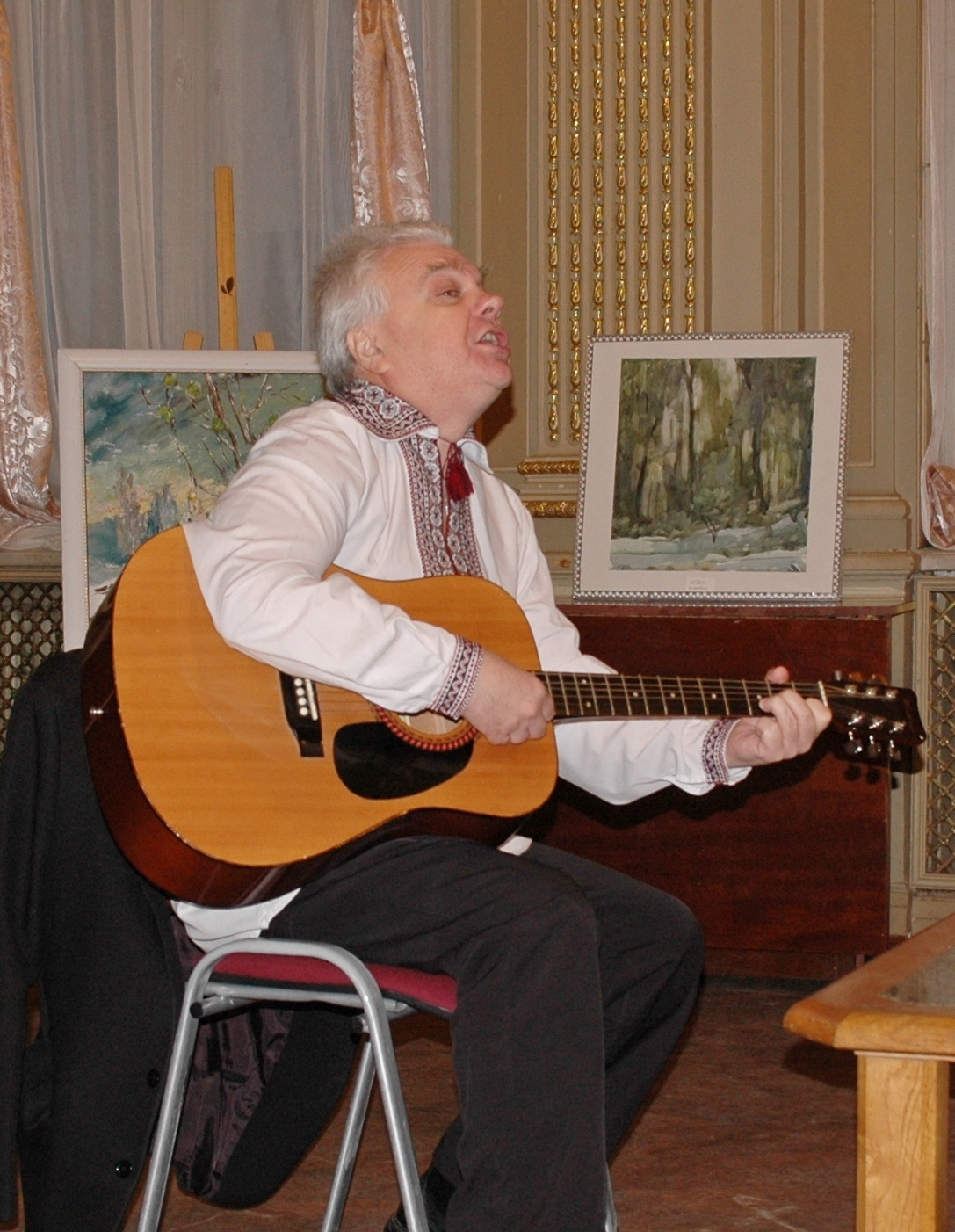 Фото зроблене під час сольного концерту В.Б. Петровського «Шлях до Свободи», присвяченого 99-тій річниці проголошення 4-го Універсалу Української Центральної Ради.